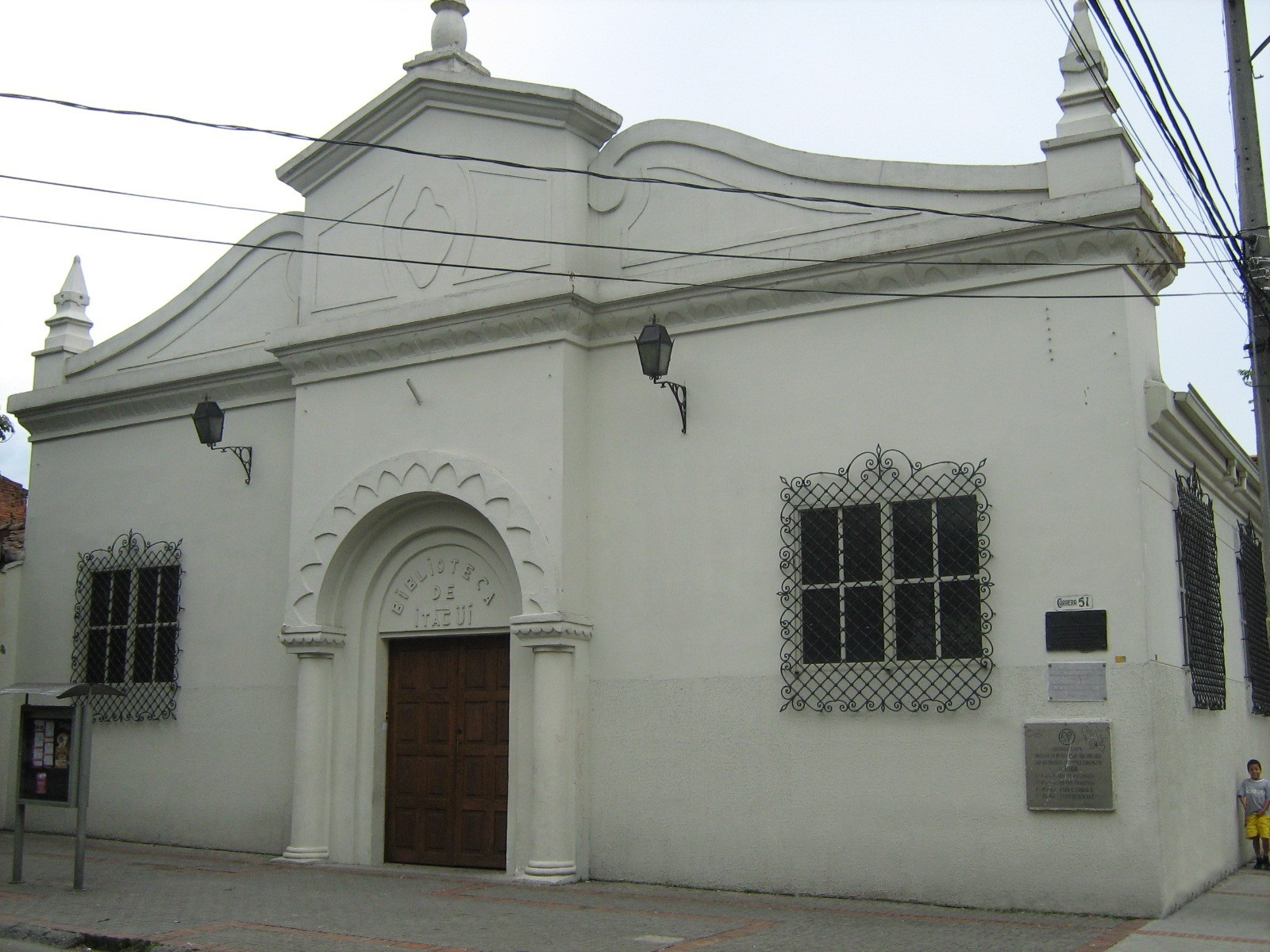 Auditorio Cultural de la Biblioteca de Itagüí Diego Echavarría Misas, antiguamente fue la sede de dicha biblioteca. Itagüi, Colombia